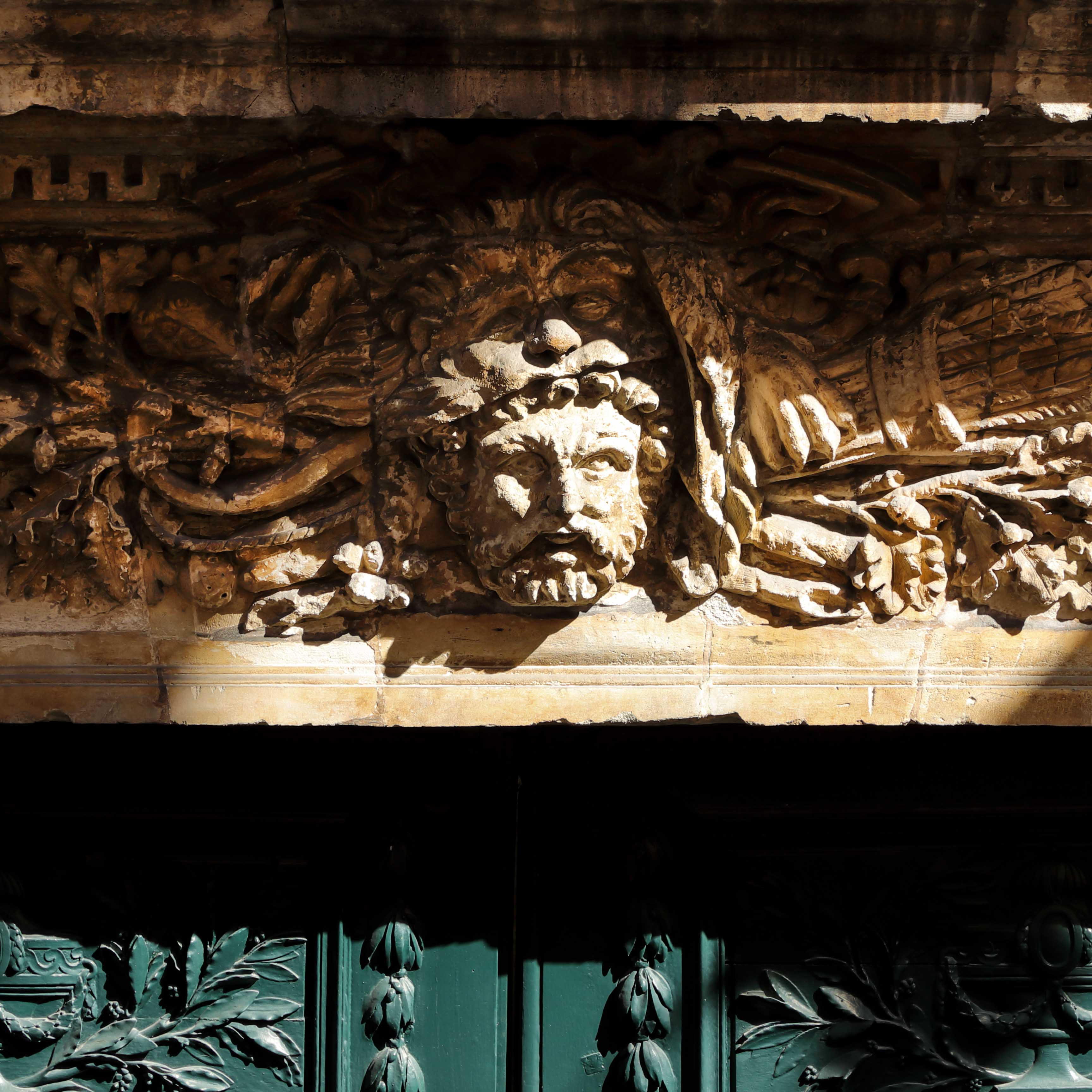 Tête d'Héraclès coiffée de la peau du lion de Némée. Tuer ce lion et le ramener à Eurysthée constitue le premier des douze travaux qu'Héraclès doit accomplir.